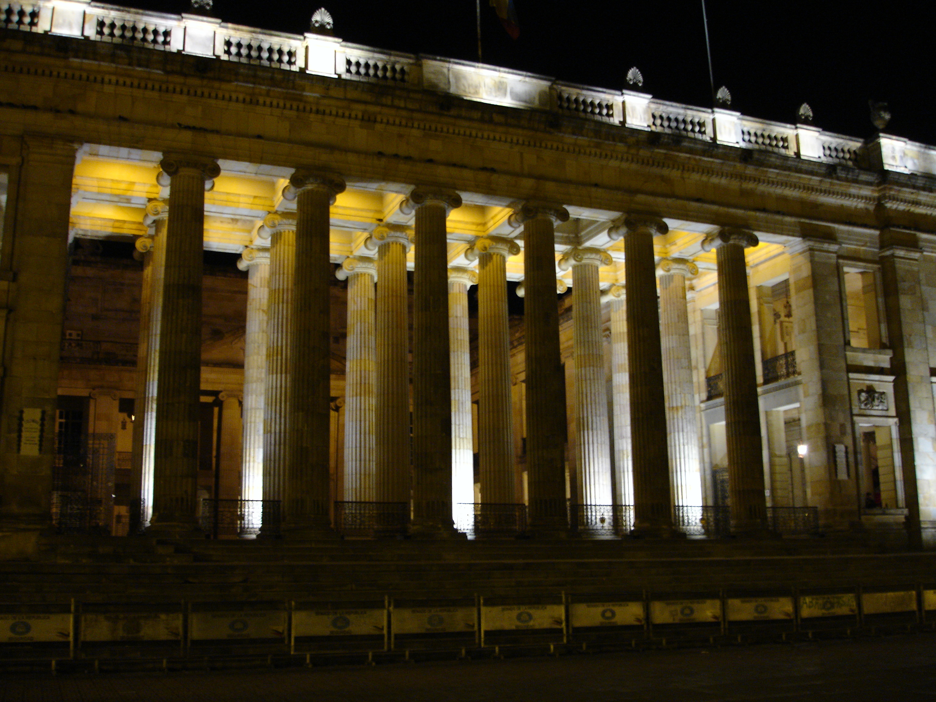 Colombian congress, called "Capitolio Nacional" in Bogotá